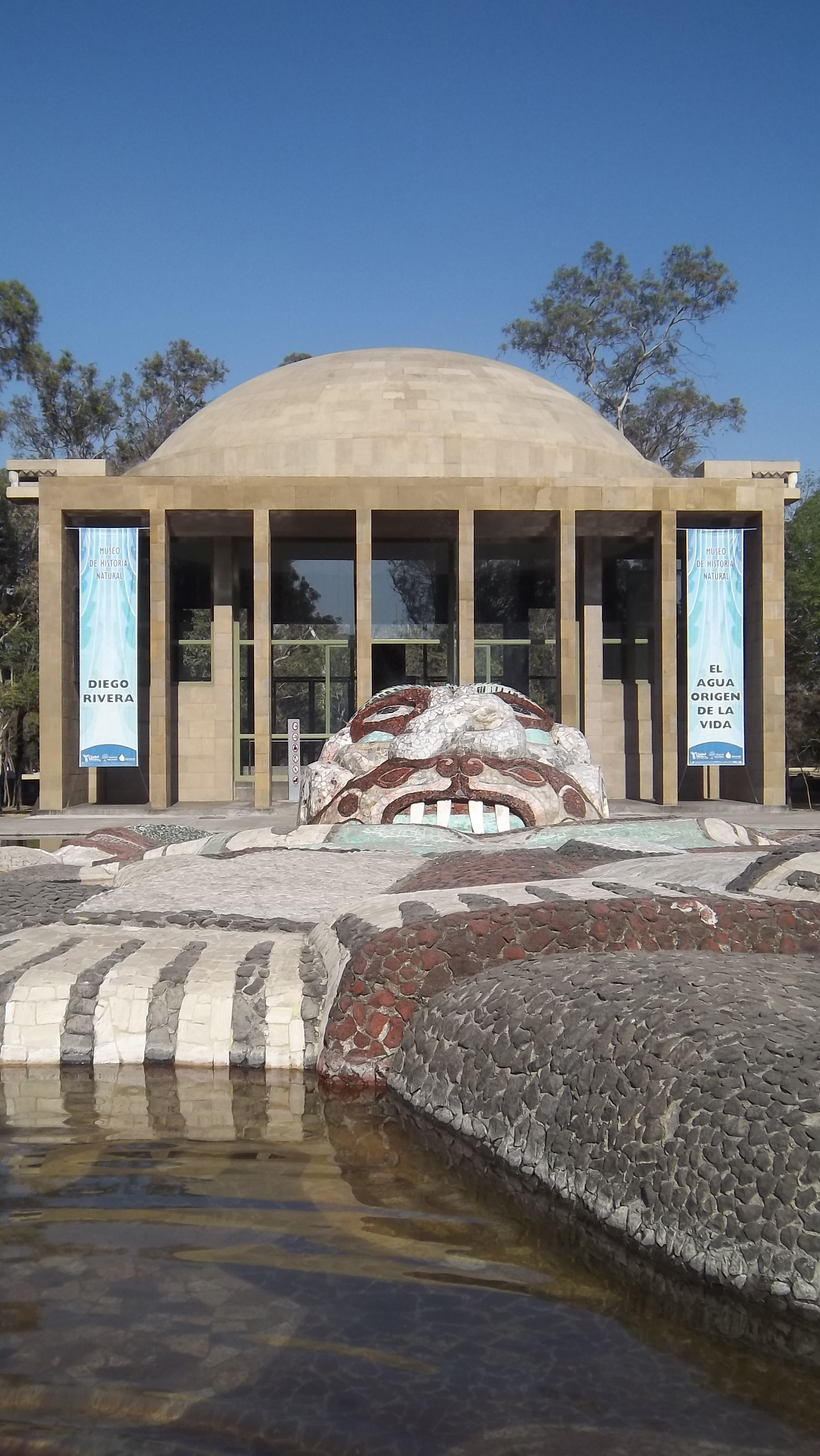 Cárcamo de Dolores y Fuente de Tláloc, Chapultepec, Ciudad de México.